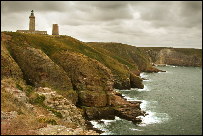 Cap Fréhel, Breizh-Bretagne.